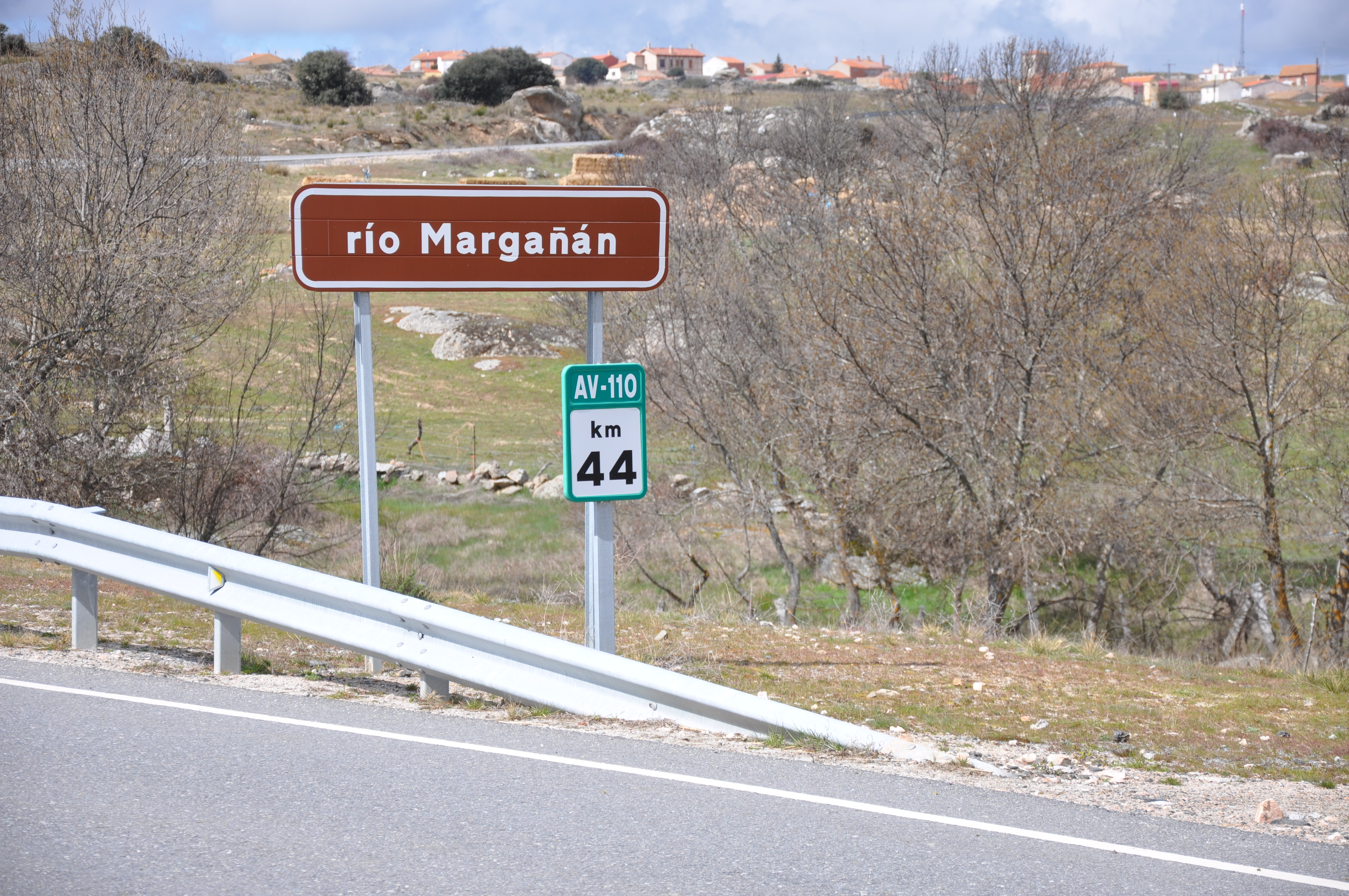 Río Margañán en Cabezas del Villar, Av, España